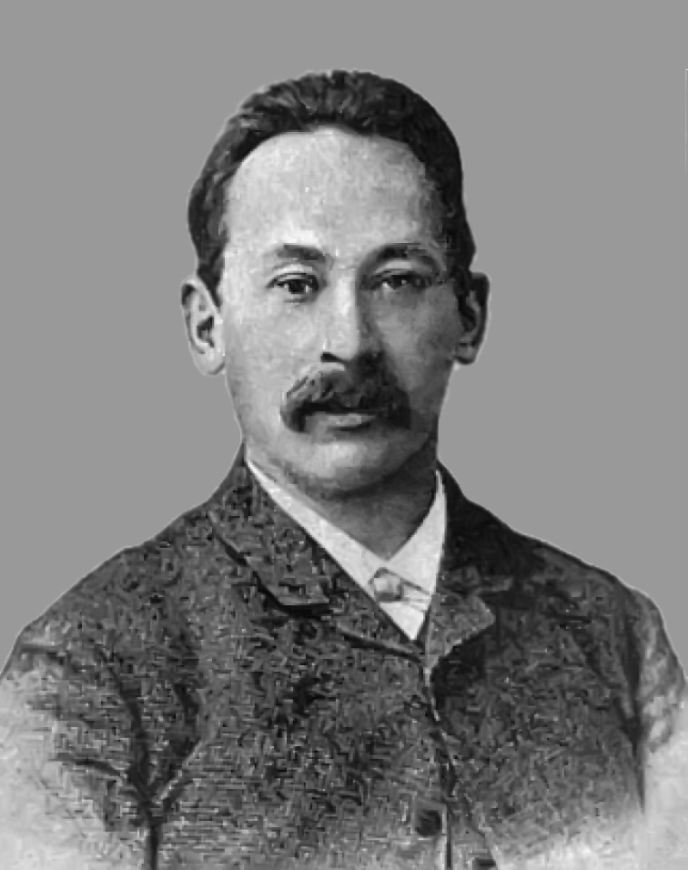 Альтани Ипполит Карлович, капельмейстер, 1887 год